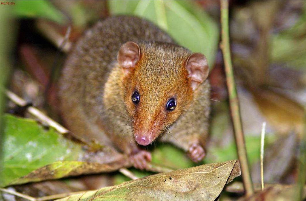 Imagem de Monodelphis scalops